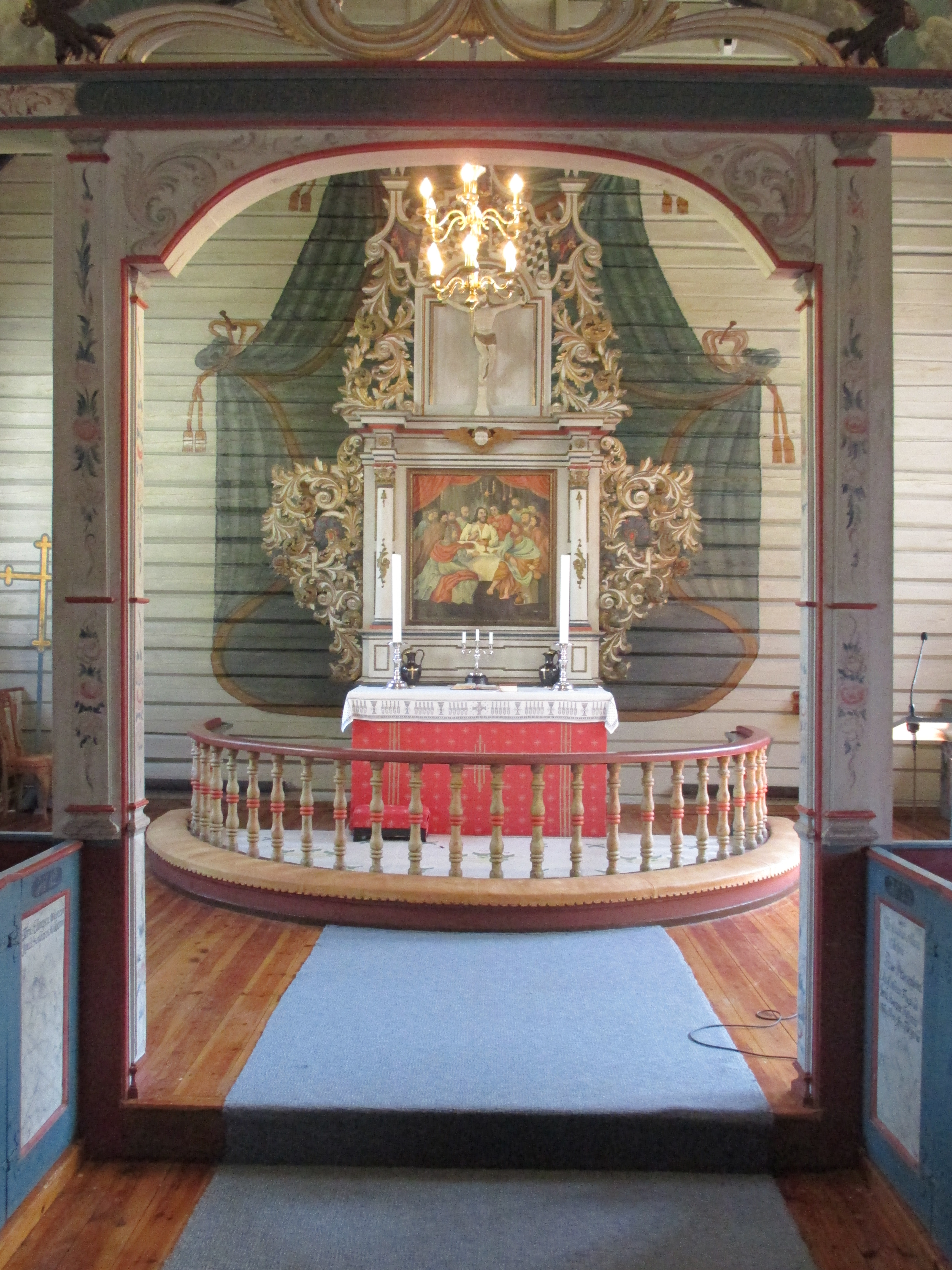 Mot alteret i Austre Moland kirke